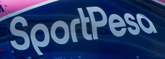 Lance Stroll in his Racing Point RP19 during Formula 1 Hungarian Grand Prix 2019 on the Hungaroring